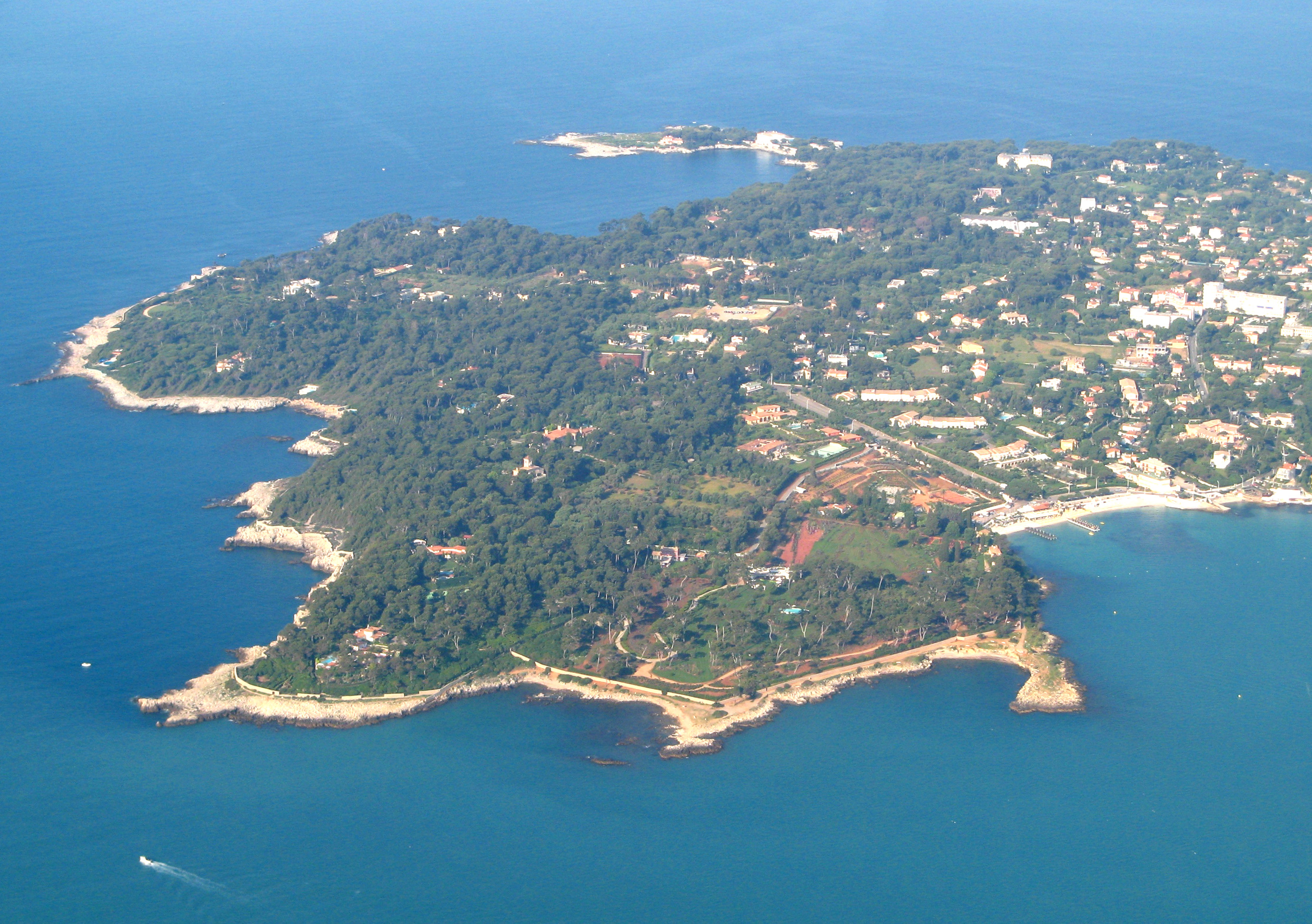 Le cap d'Antibes vu d'avion, France.